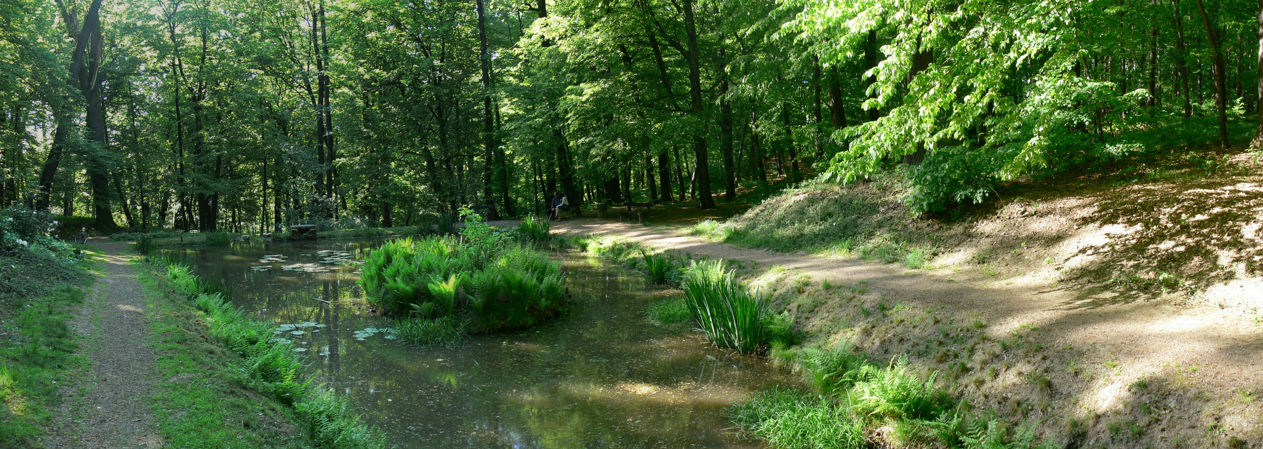 Racibórz - Arboretum Bramy Morawskiej, staw cienisty